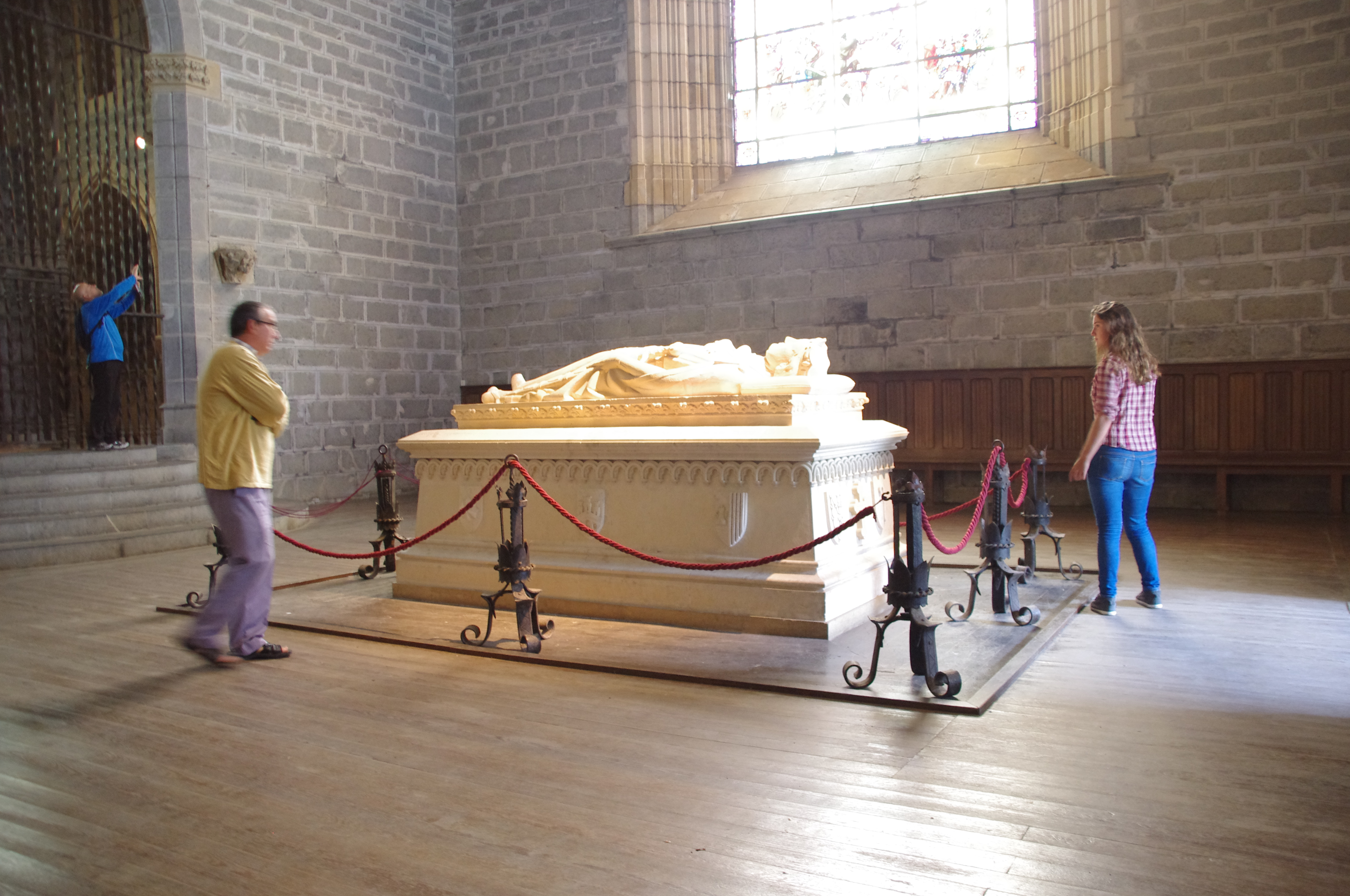 Orreagan errege nafarraren hilobia